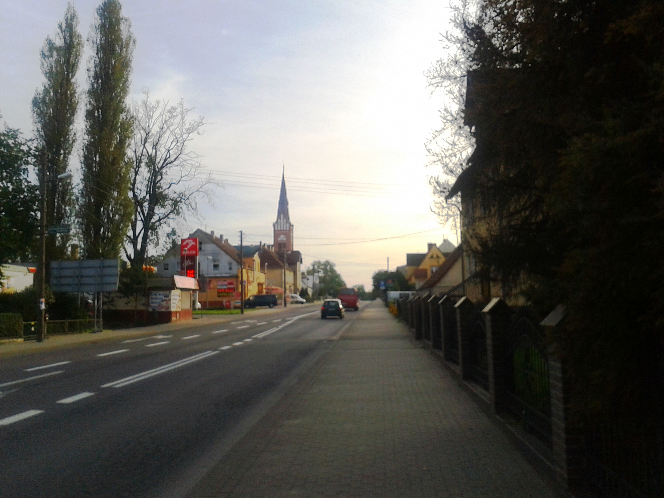 Płoty - widok na miasto